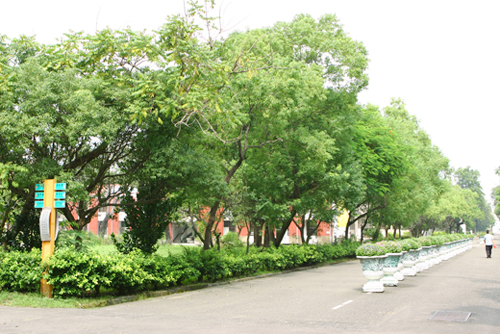 台南高工校園一角